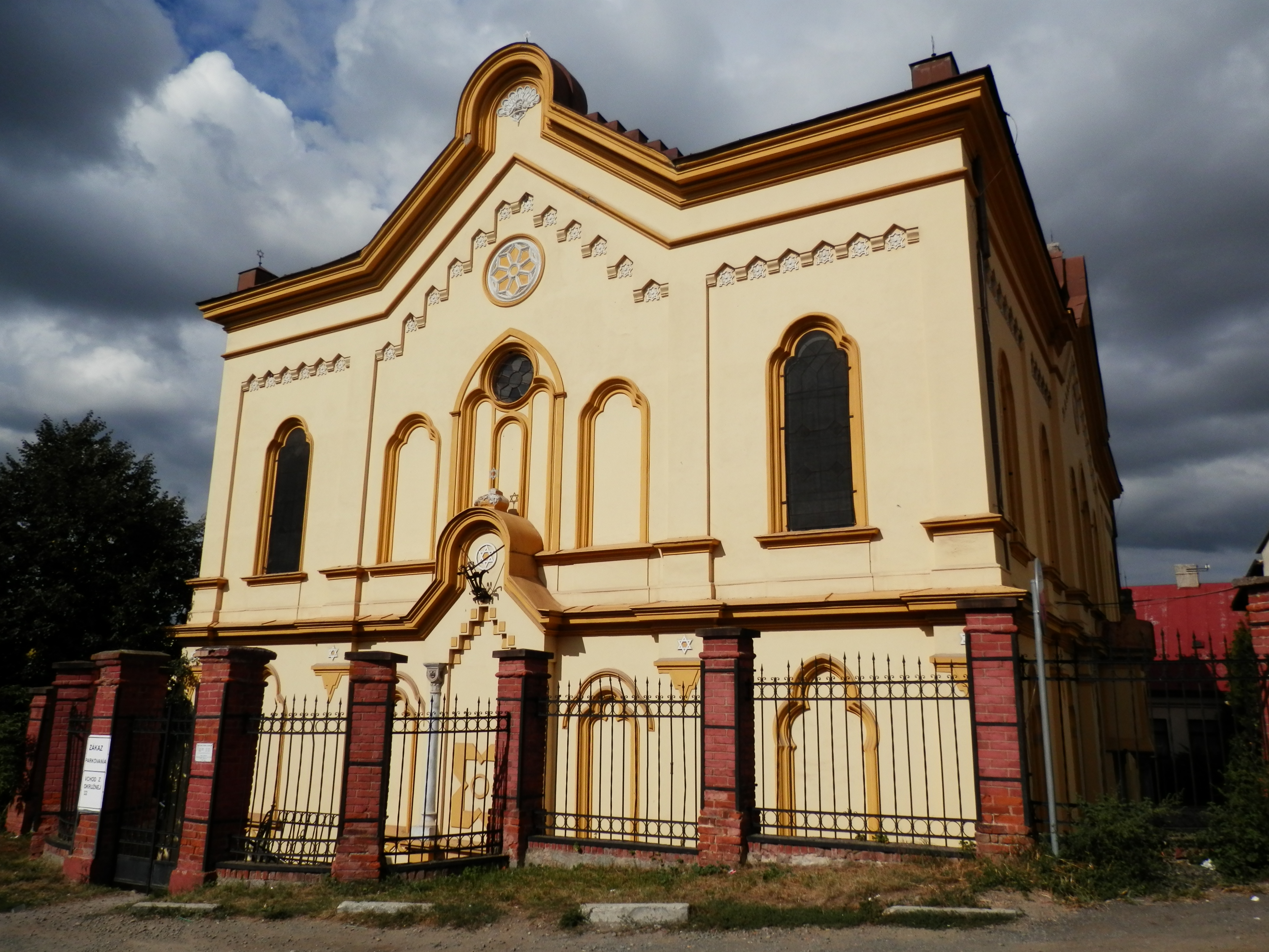 Židovská synagóga. Pohľad z Jarkovej ulice. Východná strana synagógy. Mesto Prešov.